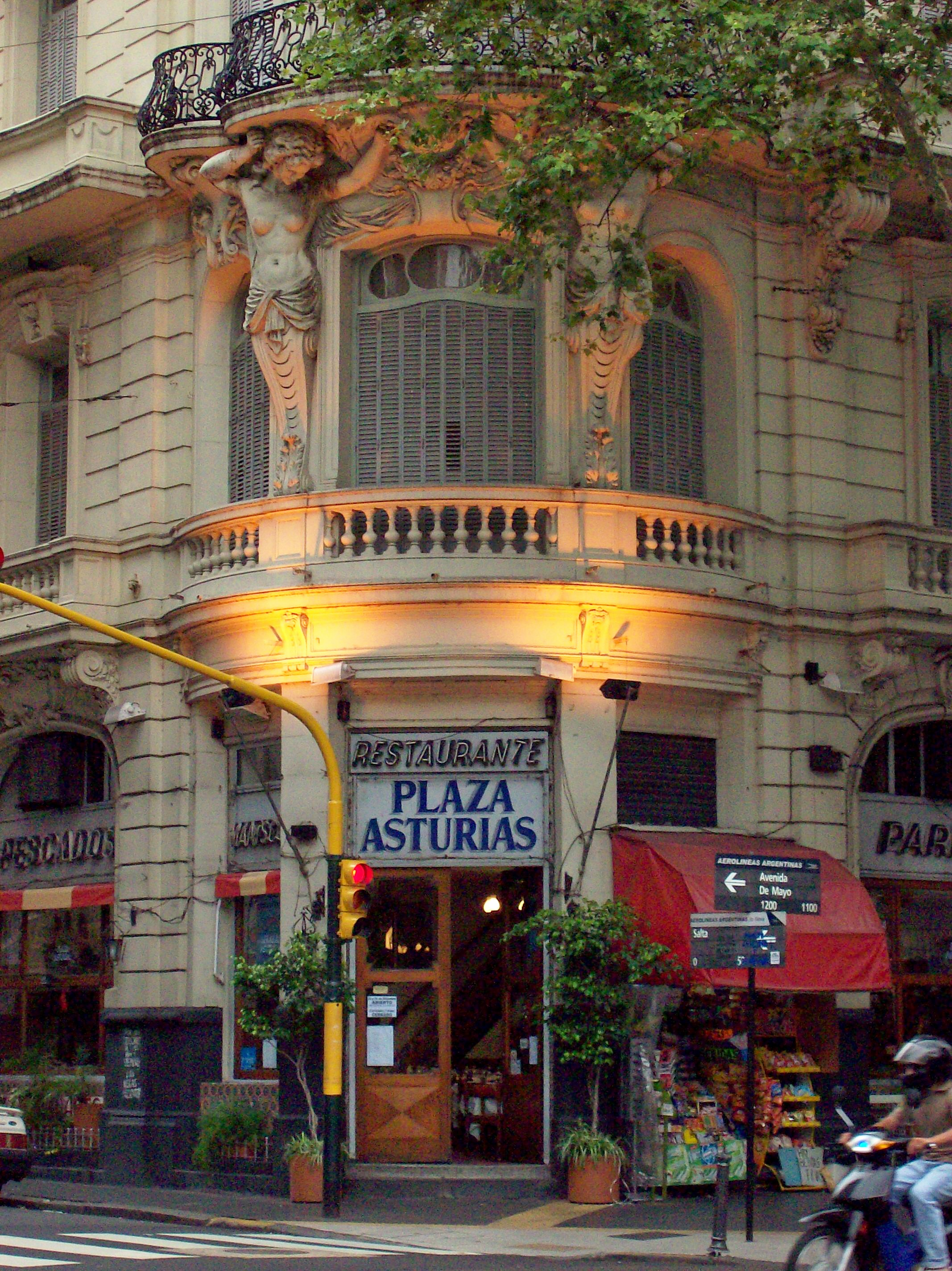 Restaurante Plaza Asturias, Entrada al ex Hotel París, en Avenida de Mayo, Buenos Aires